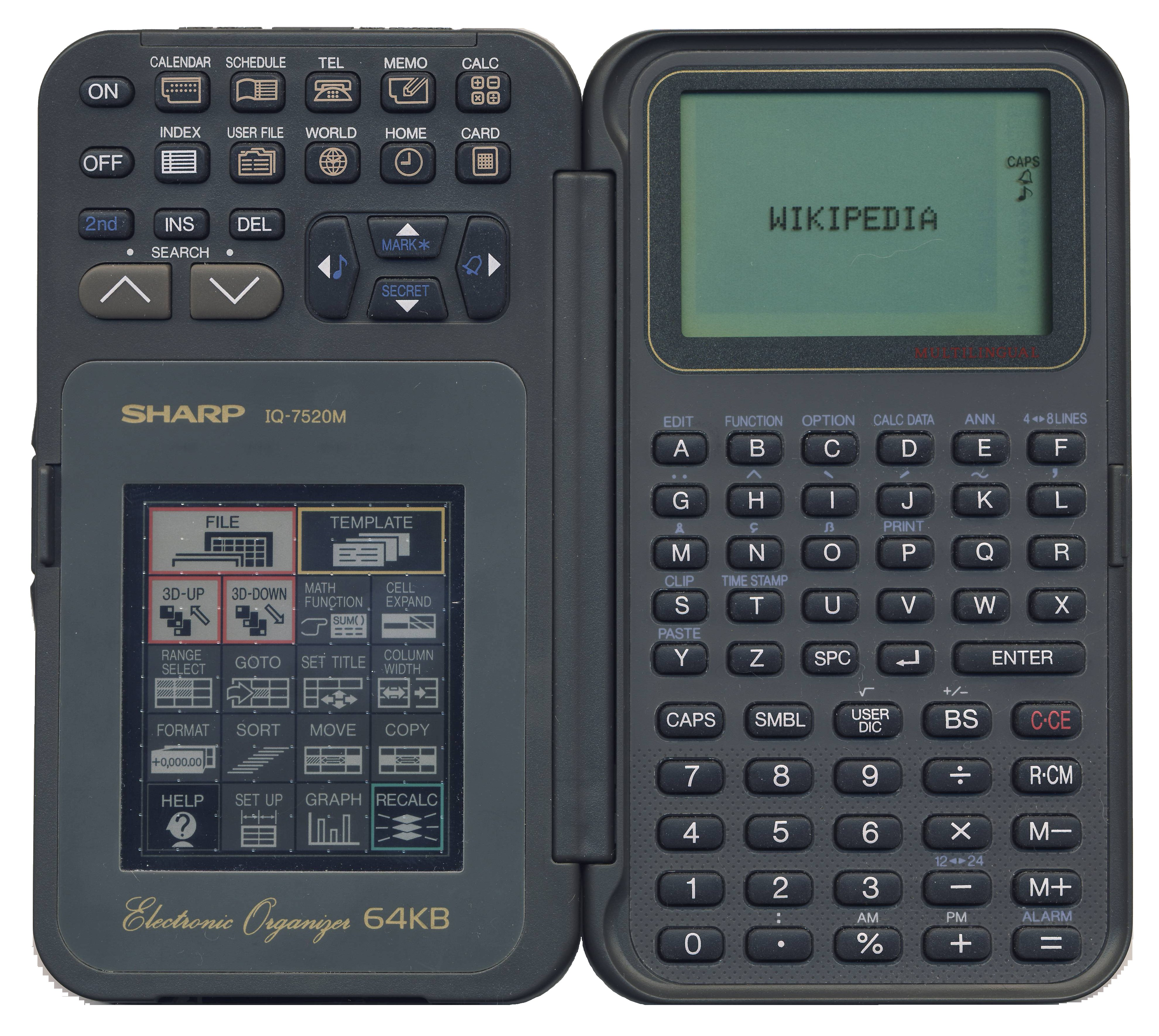 Electronic organizer SHARP IQ-7520M